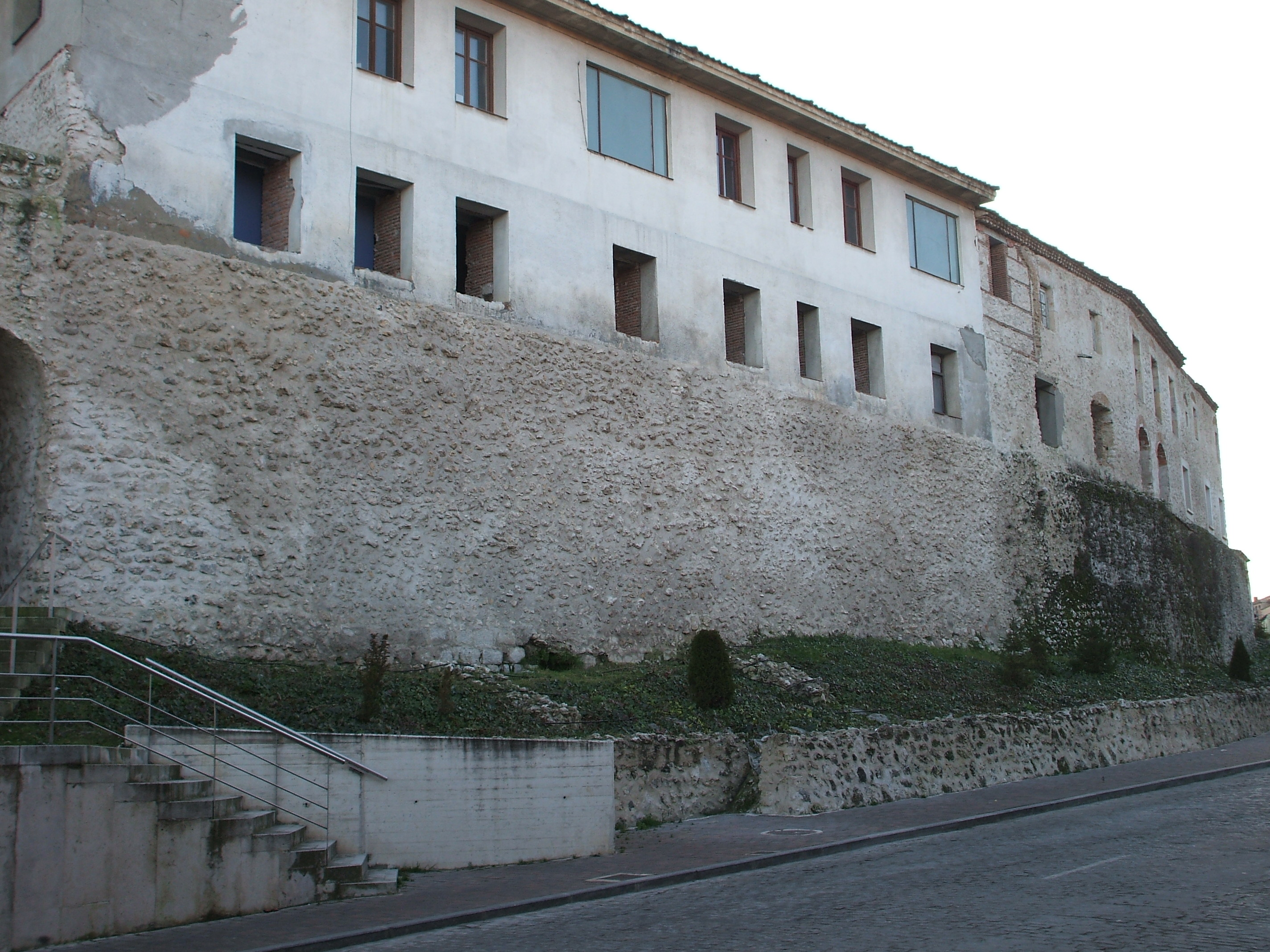 Paño de muralla en la Calle Nueva (Cuéllar)